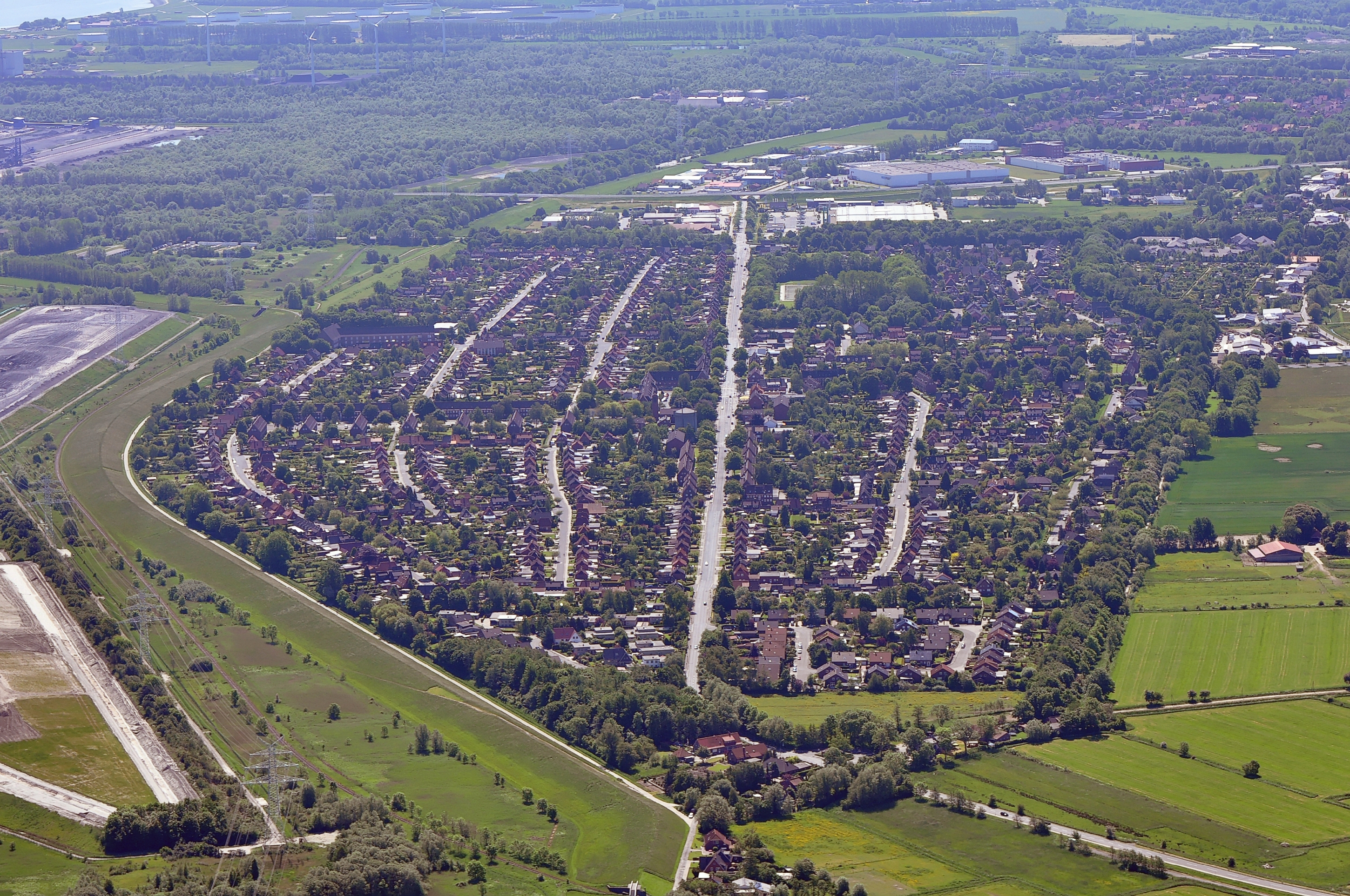 Luftbilder von der Nordseeküste 2012-05 Zu sehen ist hier der Wilhelmshavener Stadtteil Voslapp von Nordnordwesten. Die breite Straße in der Bildmitte ist die Flutstraße, hinten quer die A29.